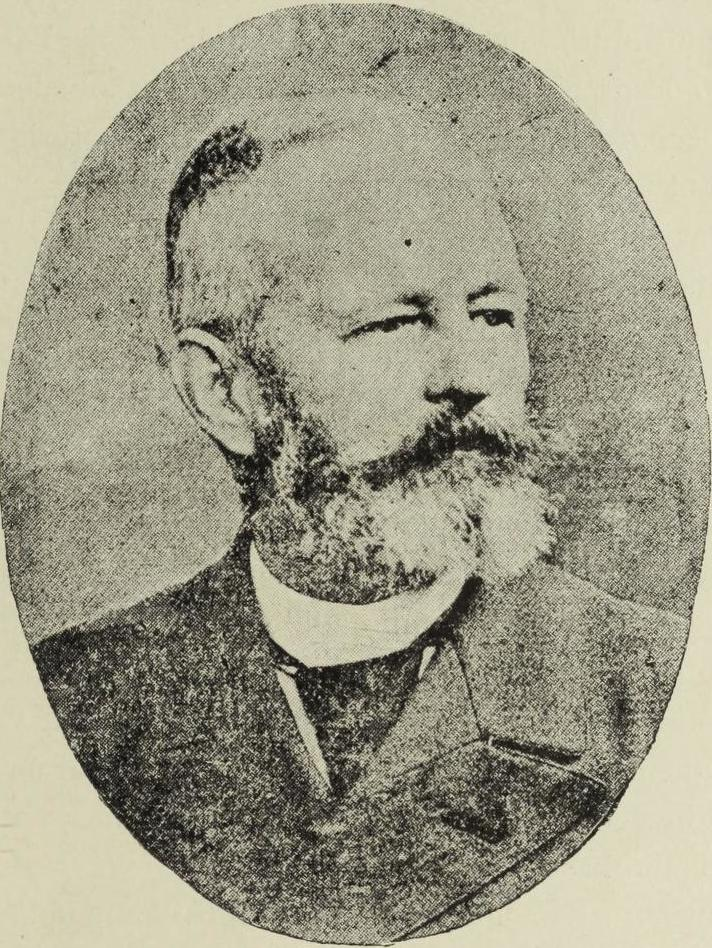 Federico Philippi (n. Friedrich Heinrich Eunom Philippi Krumwiede, 16 de diciembre de 1838-16 de enero de 1910) fue un naturalista chileno, nacido en Nápoles​ y estudió ciencias naturales allí.